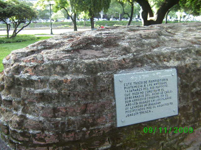 Restos de los antiguos tajamares que contenían las inundaciones del Río Mapocho (se ve al fondo) en Santiago de Chile